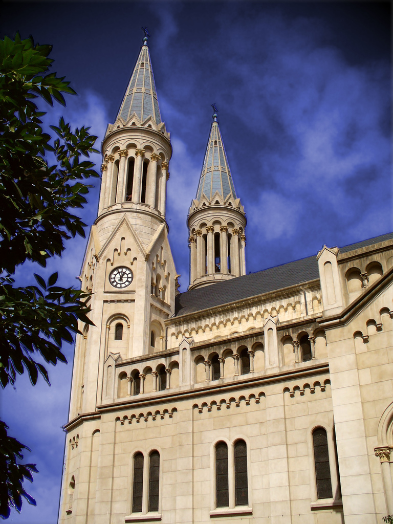 Parroquia Nuestra Señora de Guadalupe, Paraguay 3901, C1425BSC barrio de Palermo, Buenos Aires, Argentina.